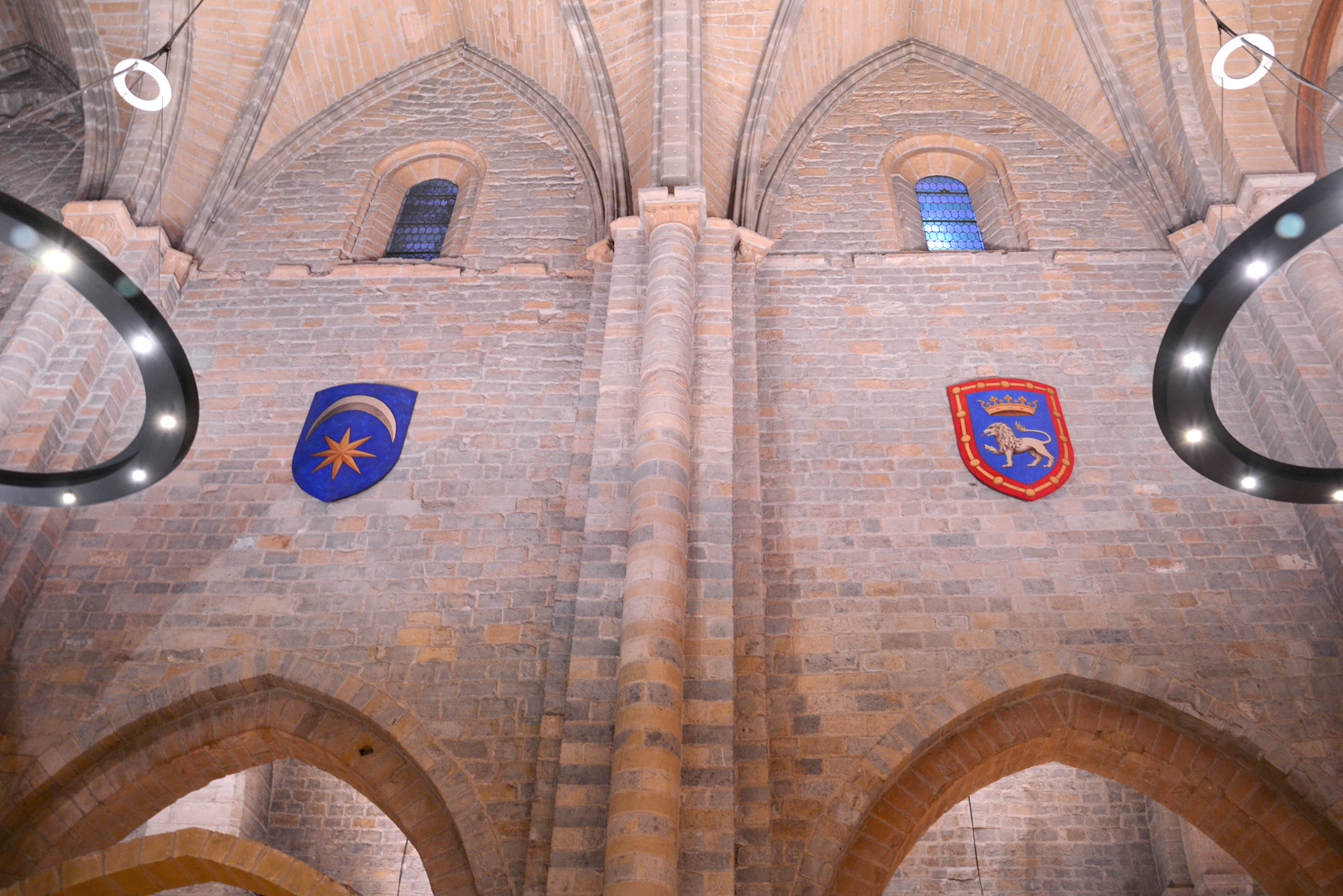 Escudos de los tres antiguos burgos y poblaciones de la ciudad de Pamplona (Navarra), que corresponden por orden, al burgo de San Cernin, la Navarrería, el actual escudo de la ciudad de Pamplona tras la unificación de los burgos, y por último, el de la población de San Nicolás